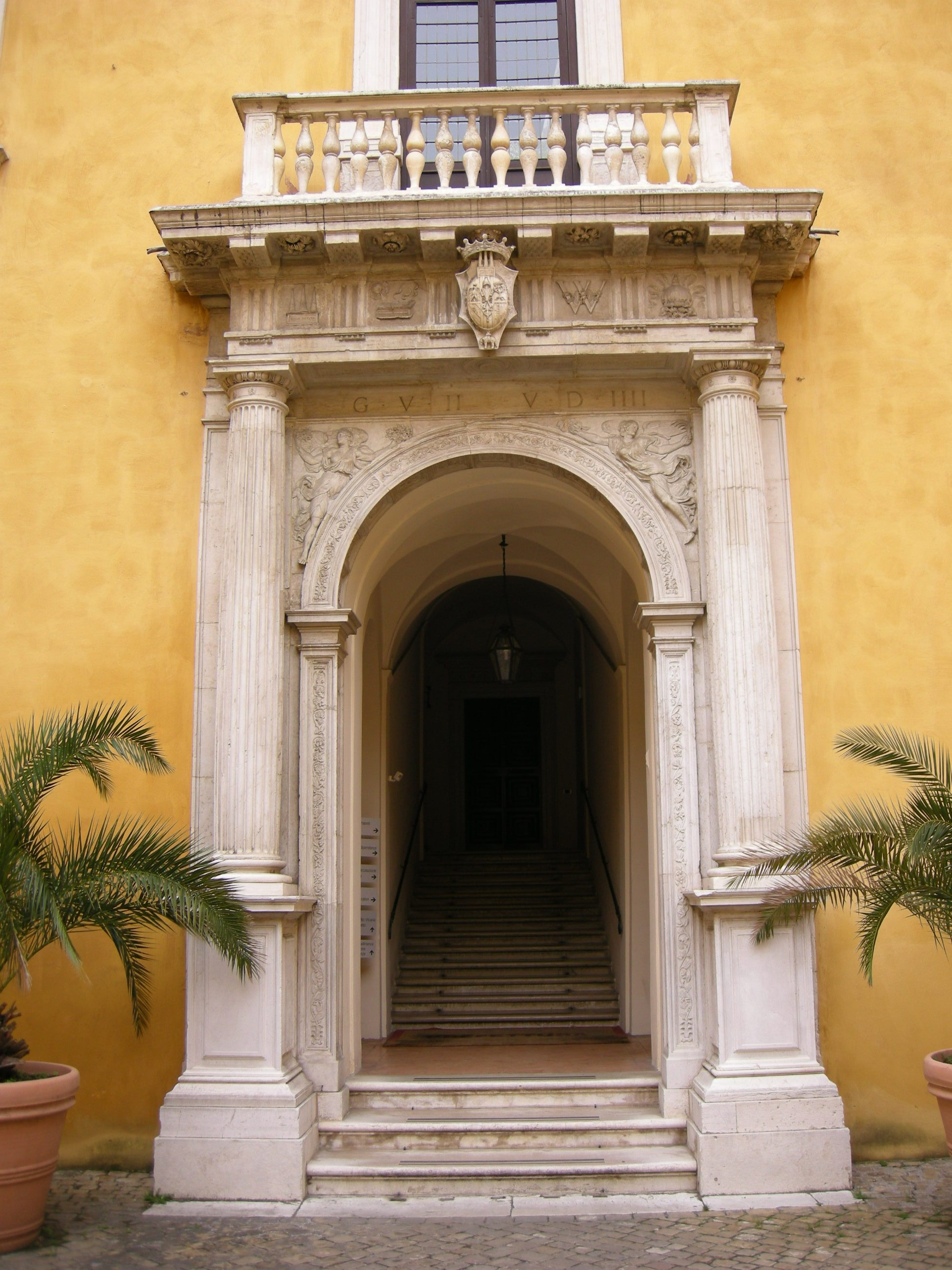 Pesaro, palazzo ducale, cortile